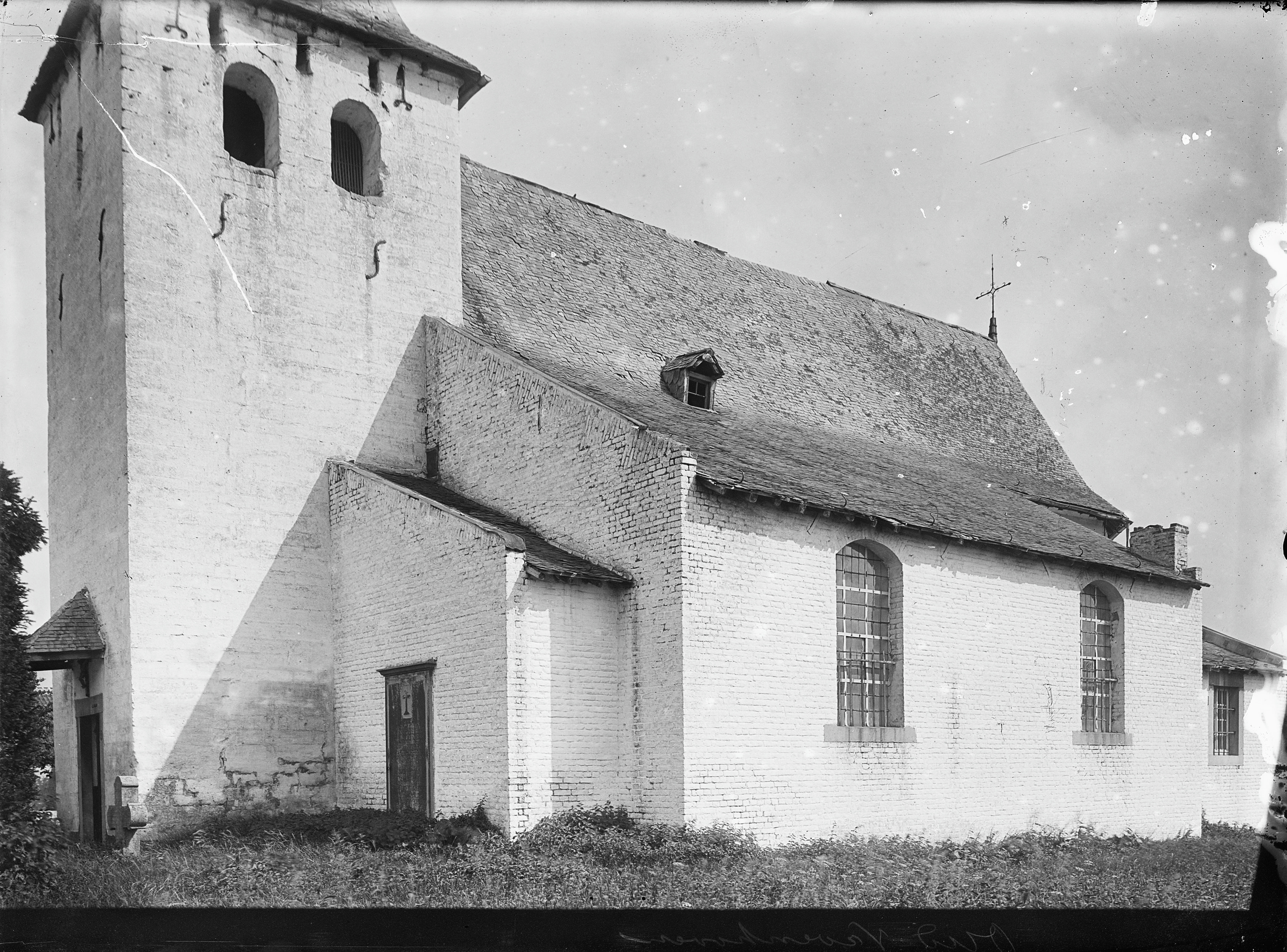 Rooms-Katholieke Kerk: kerk vanuit het zuid-westen